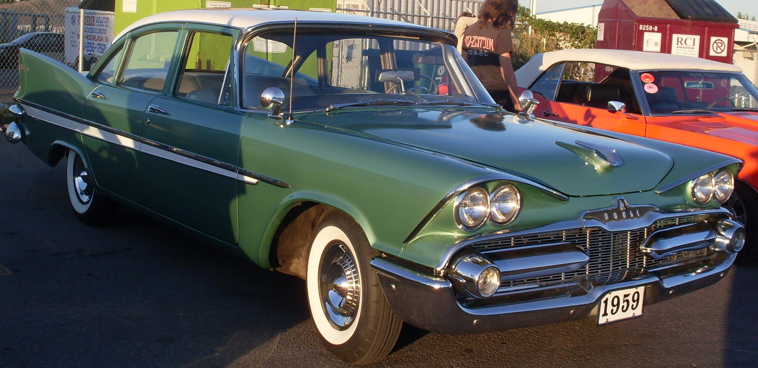 1959 Dodge Mayfair photographed in Montreal, Quebec, Canada at Auto classique VACM Montréal.